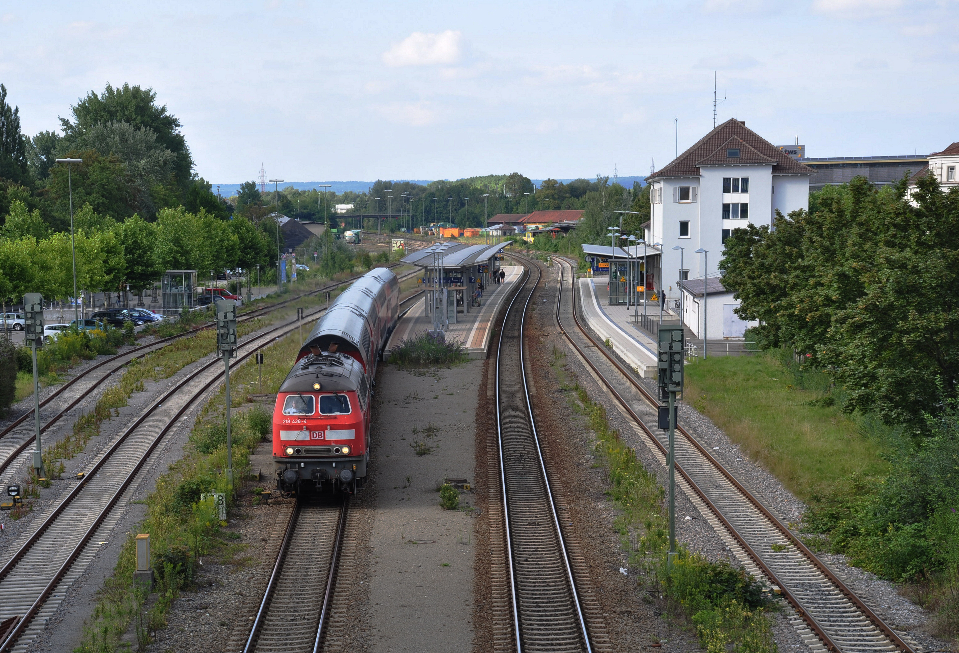 Ravensburg, Bahnhof, gesehen von der Brücke Meersburger Straße